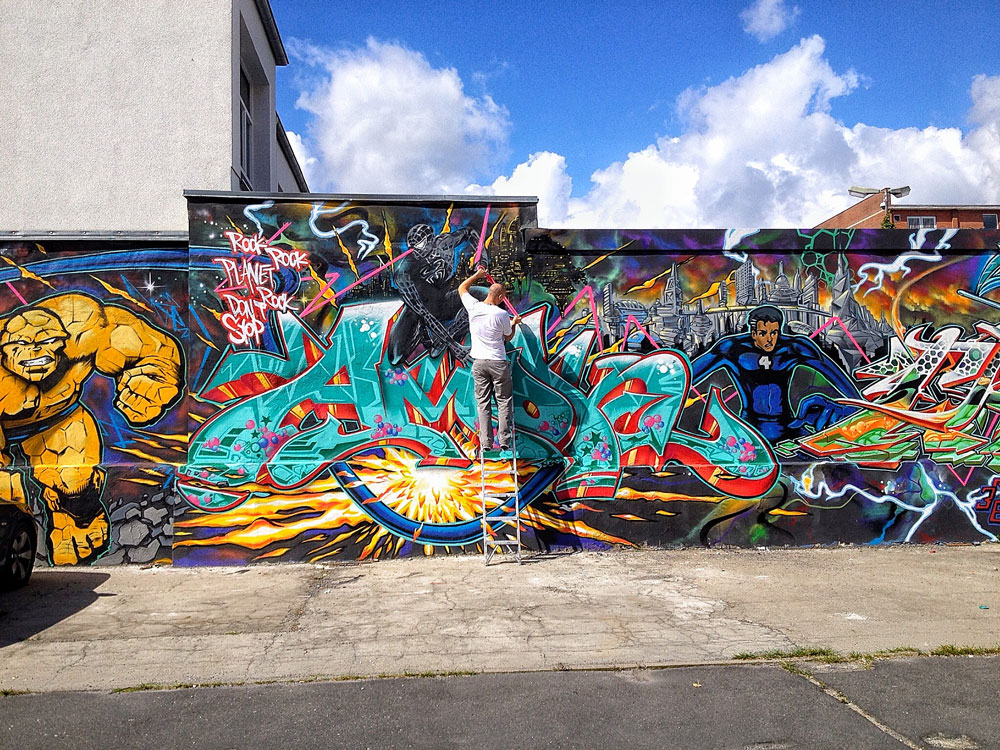 Kombination von Graffiti (AMOK) und Tape Art (TAPE OVER) an einer Wall in Berlin